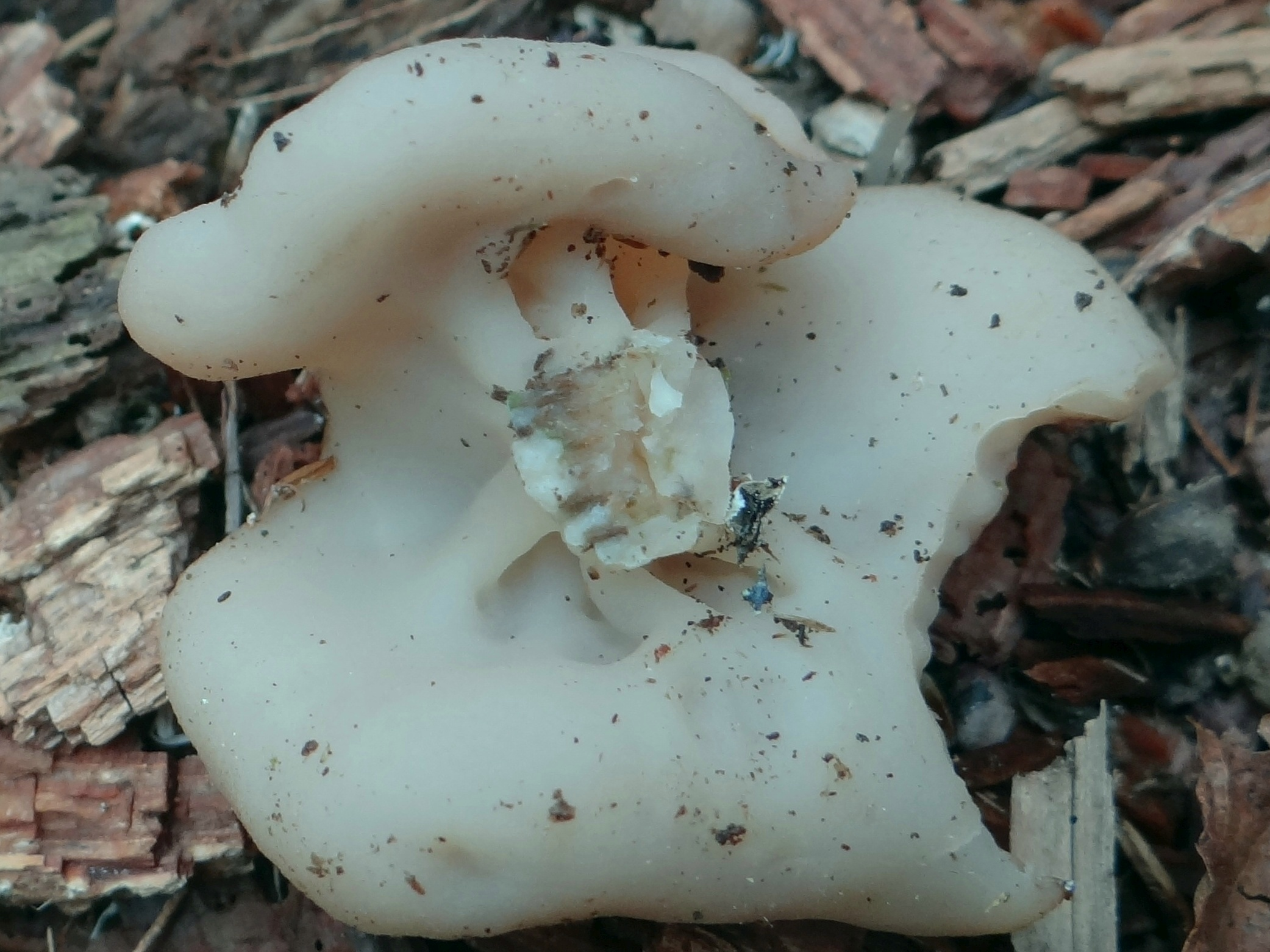 Disciotis venosa. Location: Poland, Puszcza Białowieska